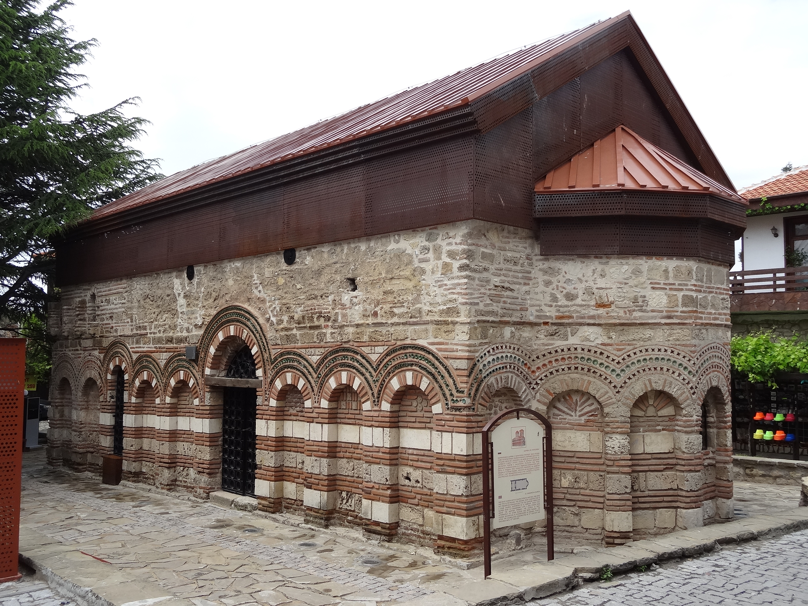 Church of Paraskevi in Nesebar